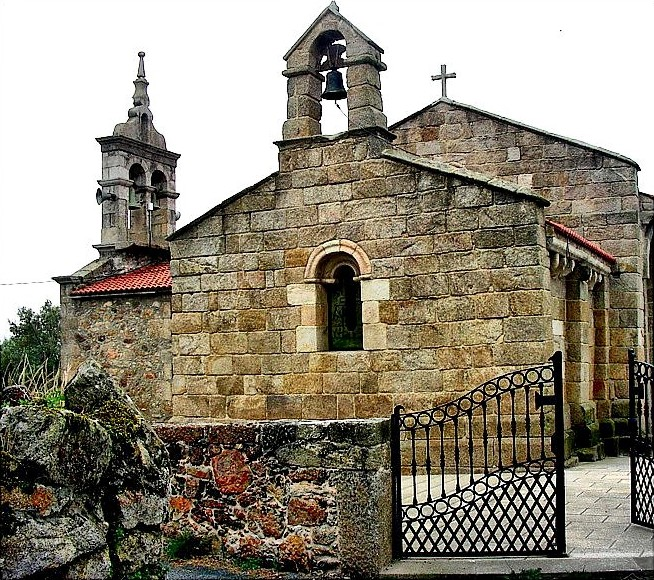 SanTirso de Oseiro axuntamento de Arteixo provincia da Coruña, romanico do seculo XII.